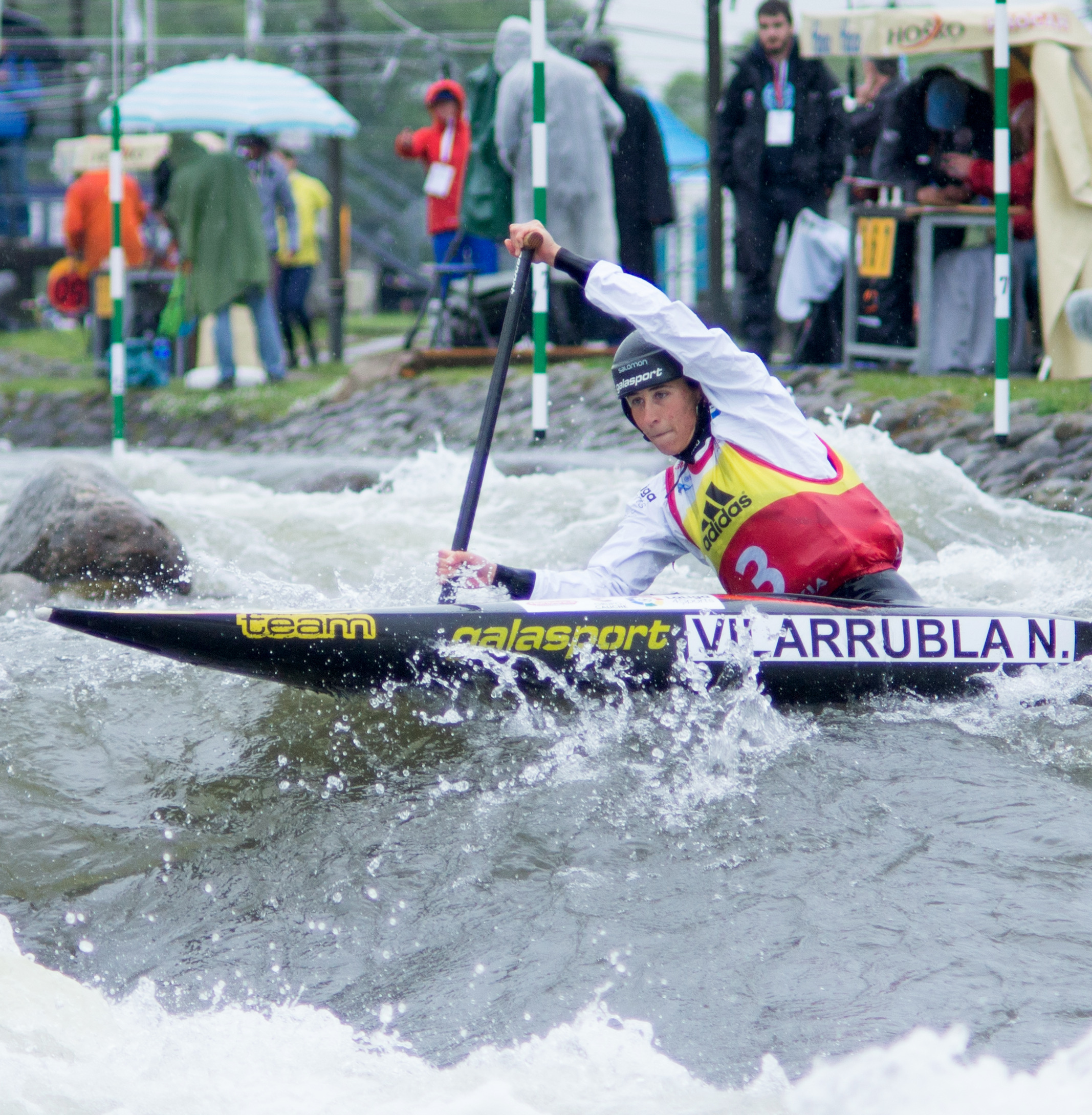 Nuria Vilarrubla